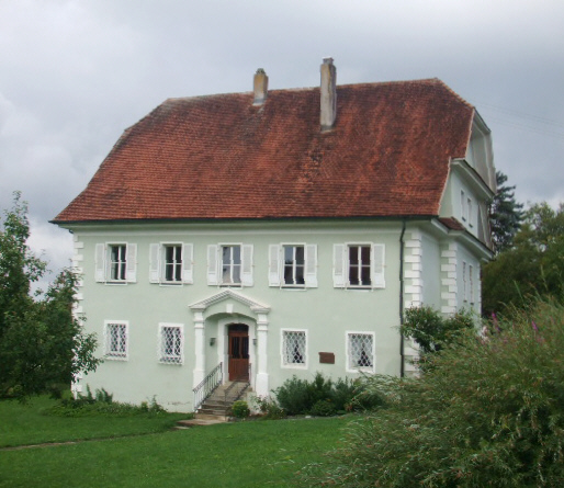 Pfarrkirche St. Peter und Paul, Benzingen, Gemeinde Winterlingen, Zollernalbkreis Pfarrhaus